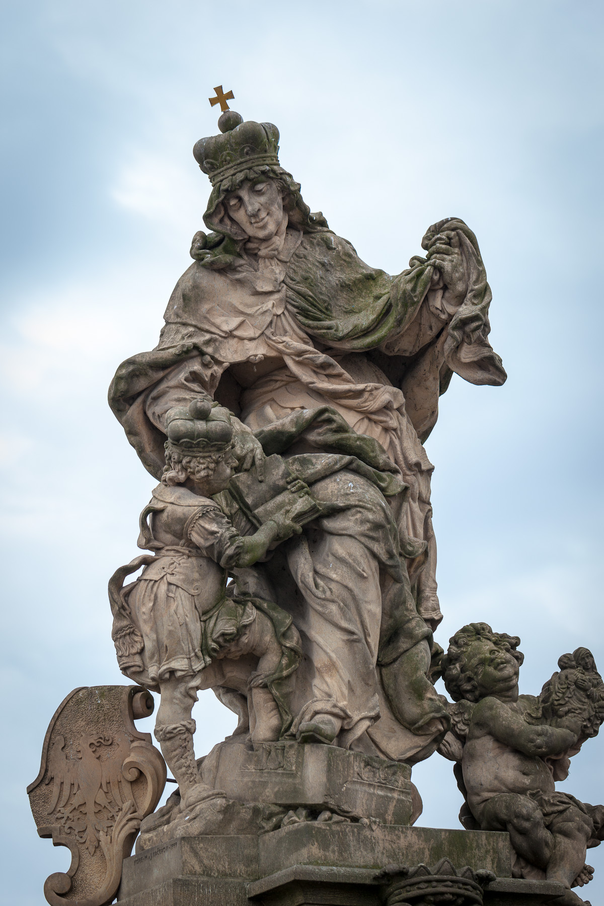 Prague